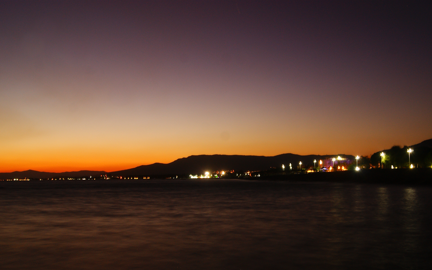 Izmir bei Nacht